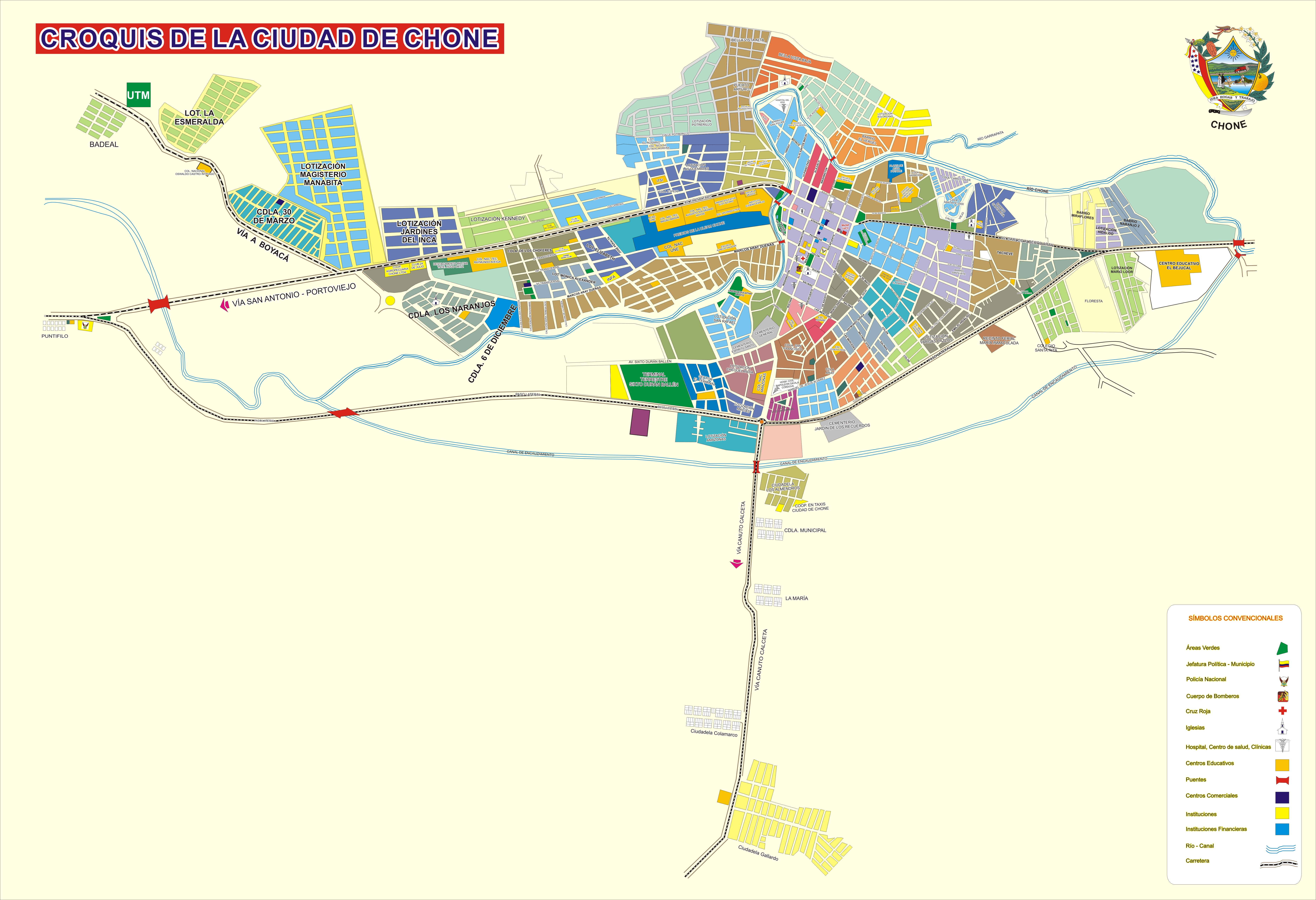 Vista de la Ciudad de Chone